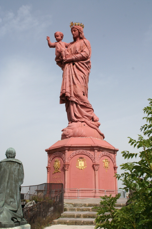 Statue de la Vierge du Puy-en-Velay, par Jean-Marie Bonnassieux